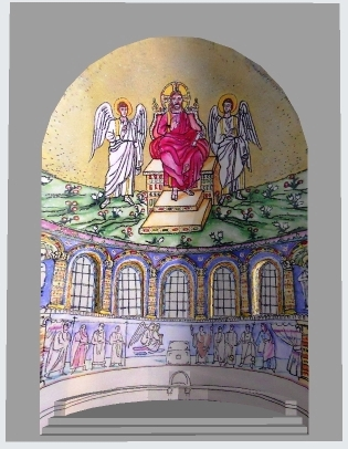 L'antico mosaico dell'abside della Basilica di Sant'Agata Maggiore in Ravenna. Disegno di Franco Franchini, ricostruzione 3d di Pufui Pc Pifpef.